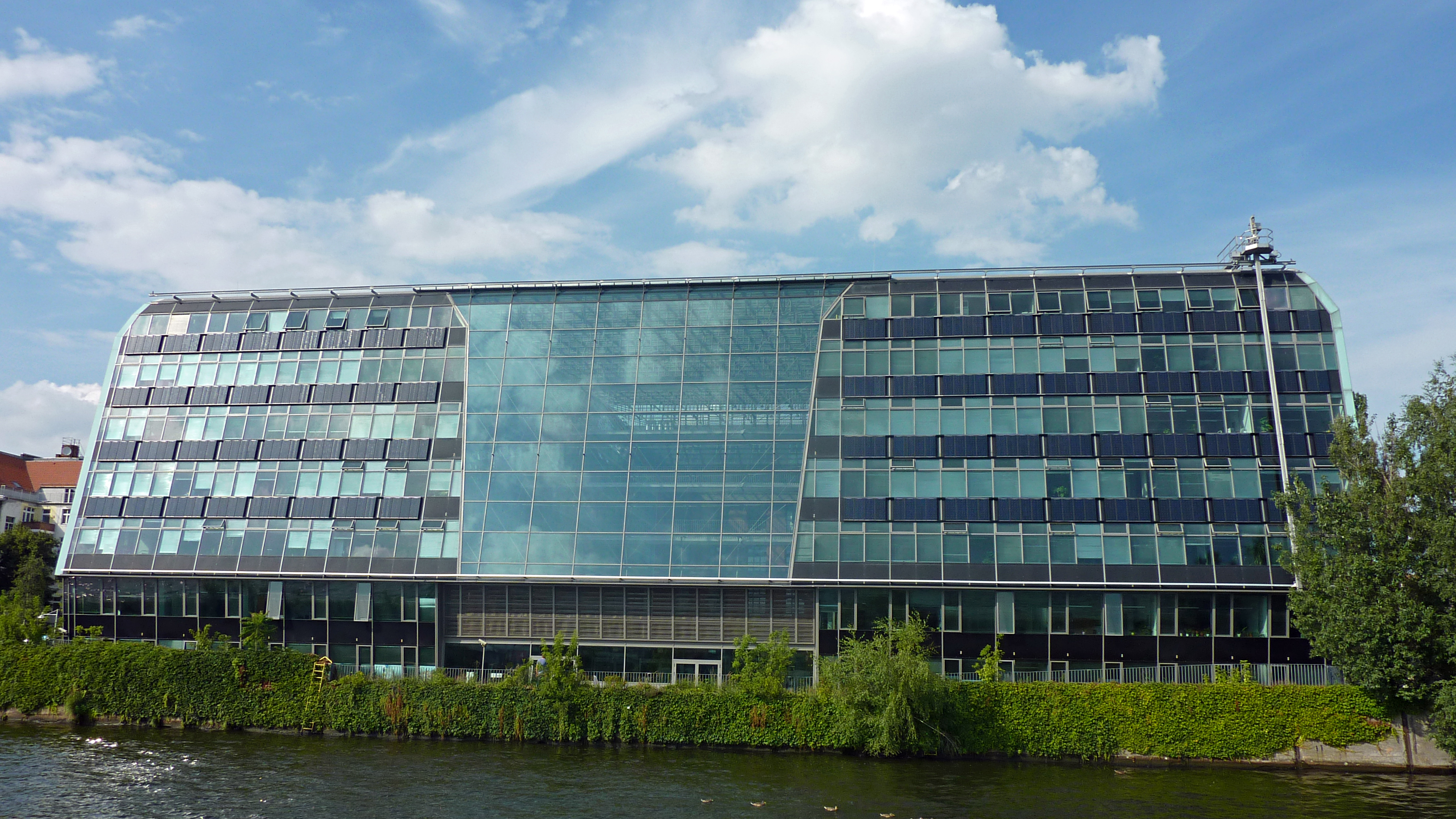 EnergieForum Berlin, spreeseitig angebauter Neubau, Berlin-Friedrichshain.